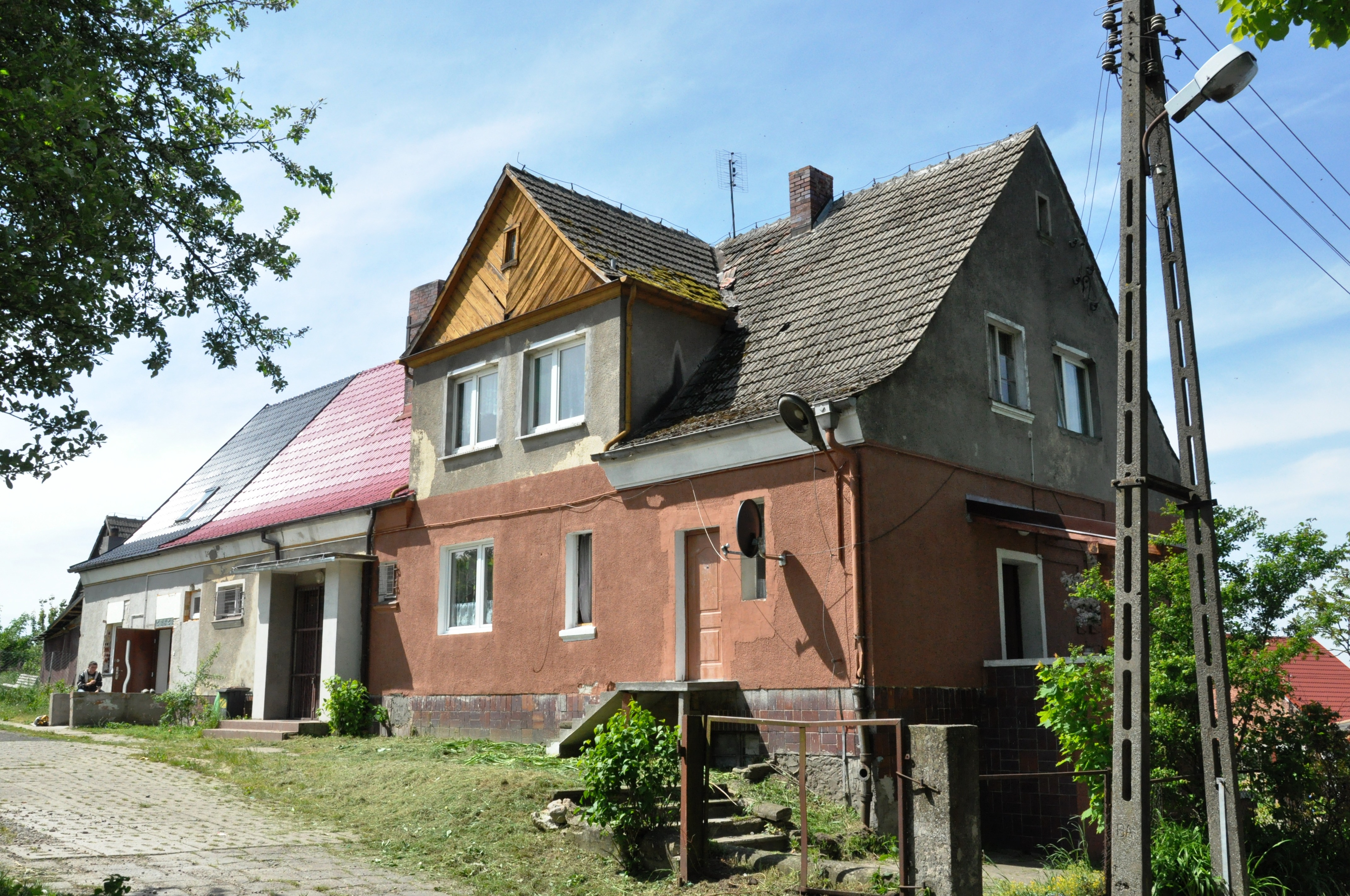 Marwice - budynek dawnej strażnicy WOP